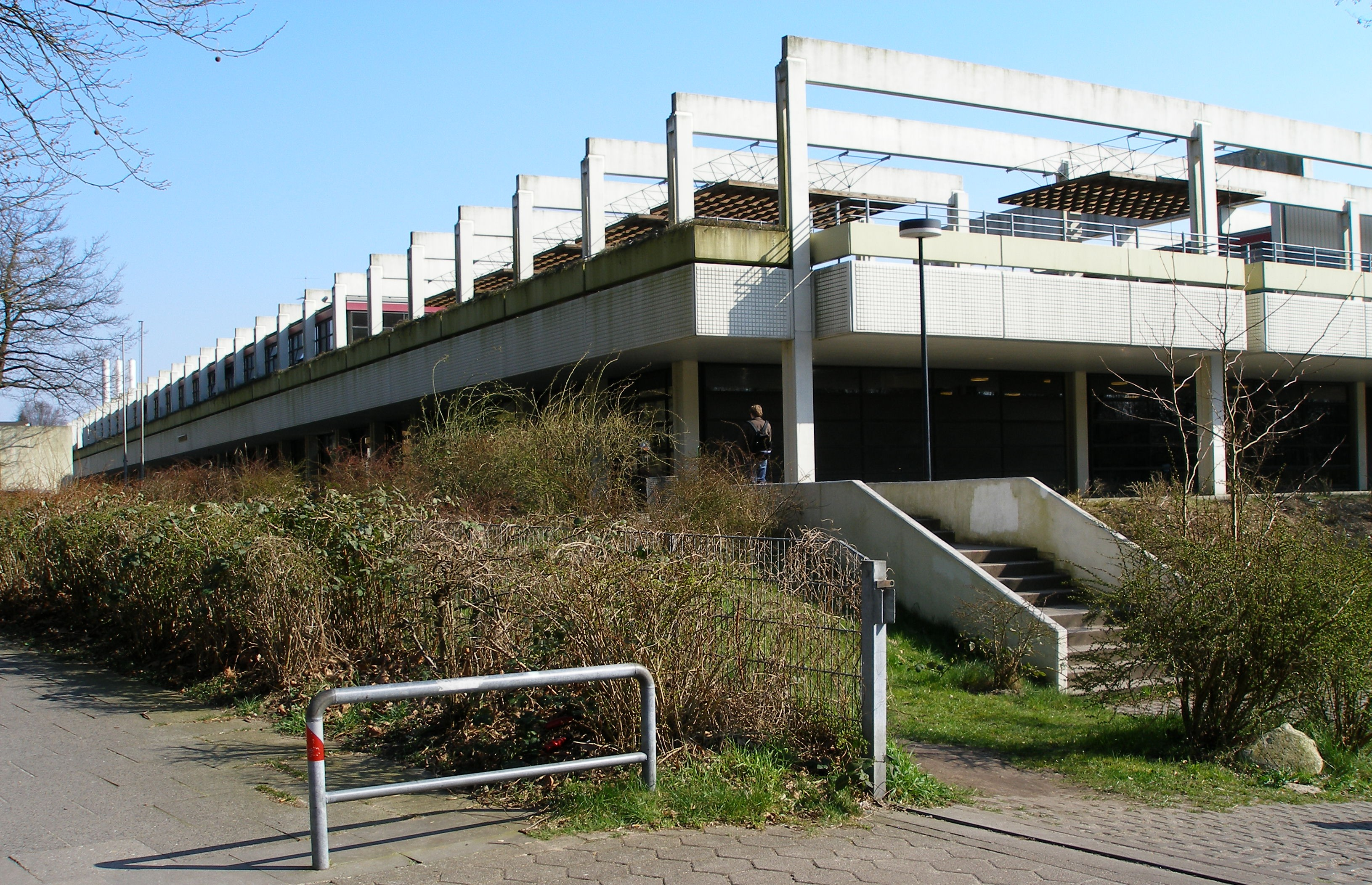 Christianeum, Hamburg; Architekt: Arne Jacobsen